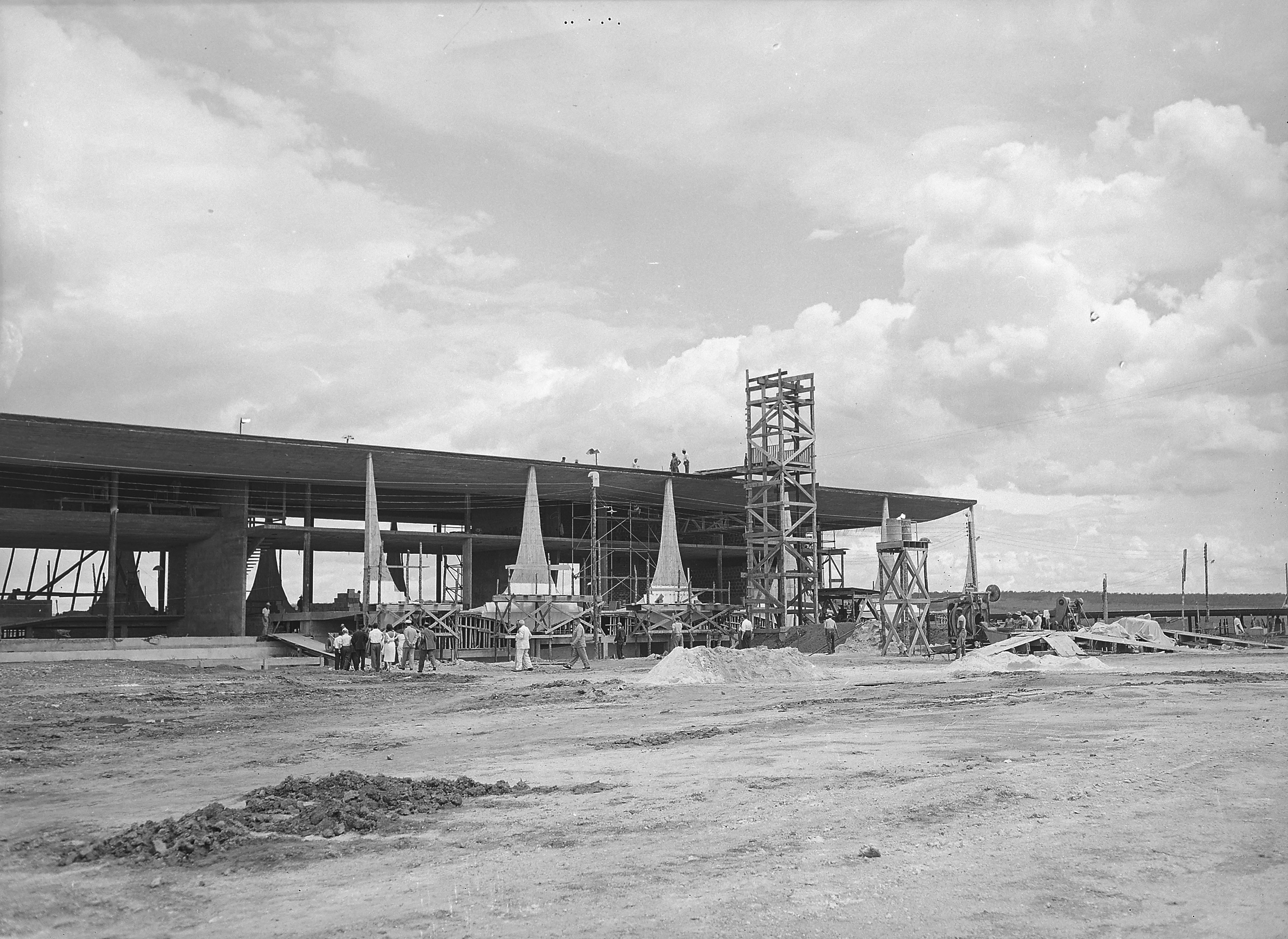 Vistas das obras do Palácio da Alvorada_3